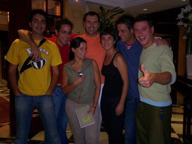 Mi encuentro con algunos reporteros de España Directo: Quique Morales, Roberto Leal, Beatriz Simó, Iñaki del Moral, Enric Company, etc. Foto tomada por Karlos de la Cruz